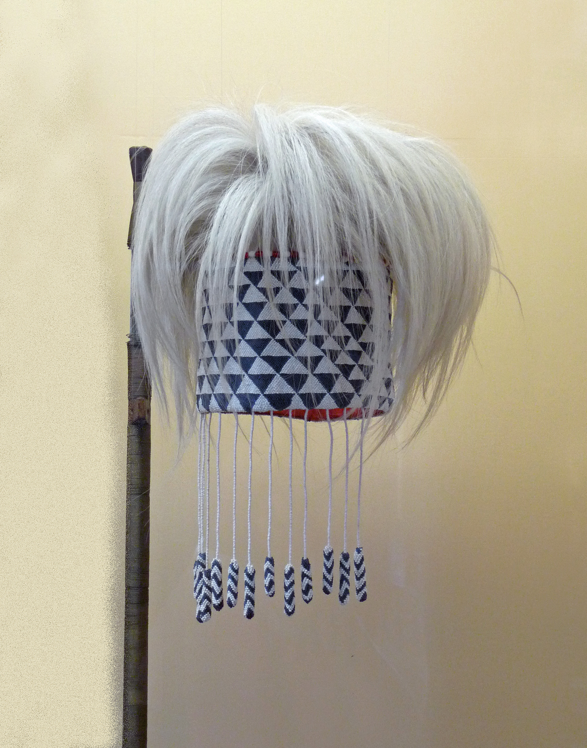 Rwanda : diadème royal appartenant au Mwami Charles Mutara III Rudahigwa, porté pour la première fois par son grand-père, Mwami Kigeri IV Rwabugiri. Fourrure de singe colobe, tissu européen recouvert de perlage, treize petits pendentifs en perles. Musée royal de l'Afrique centrale